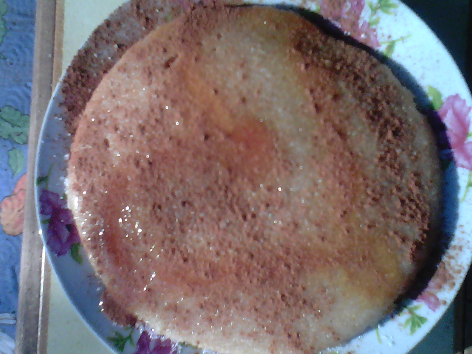 Galette de farine de maïs sucrée et revenue à la poëlle dans du beurre, saupoudrée de cannelle avec un filet de caramel